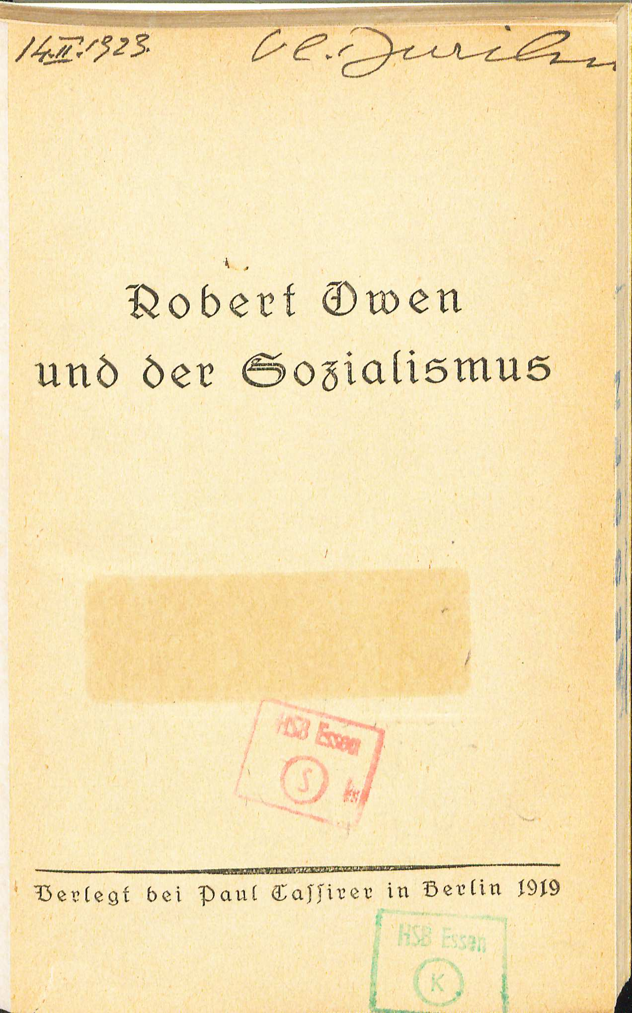 Robert Owen und der Sozialismus 1919. Aus Owens Schriften ausgewählt und eingeleitet von Helene Simon